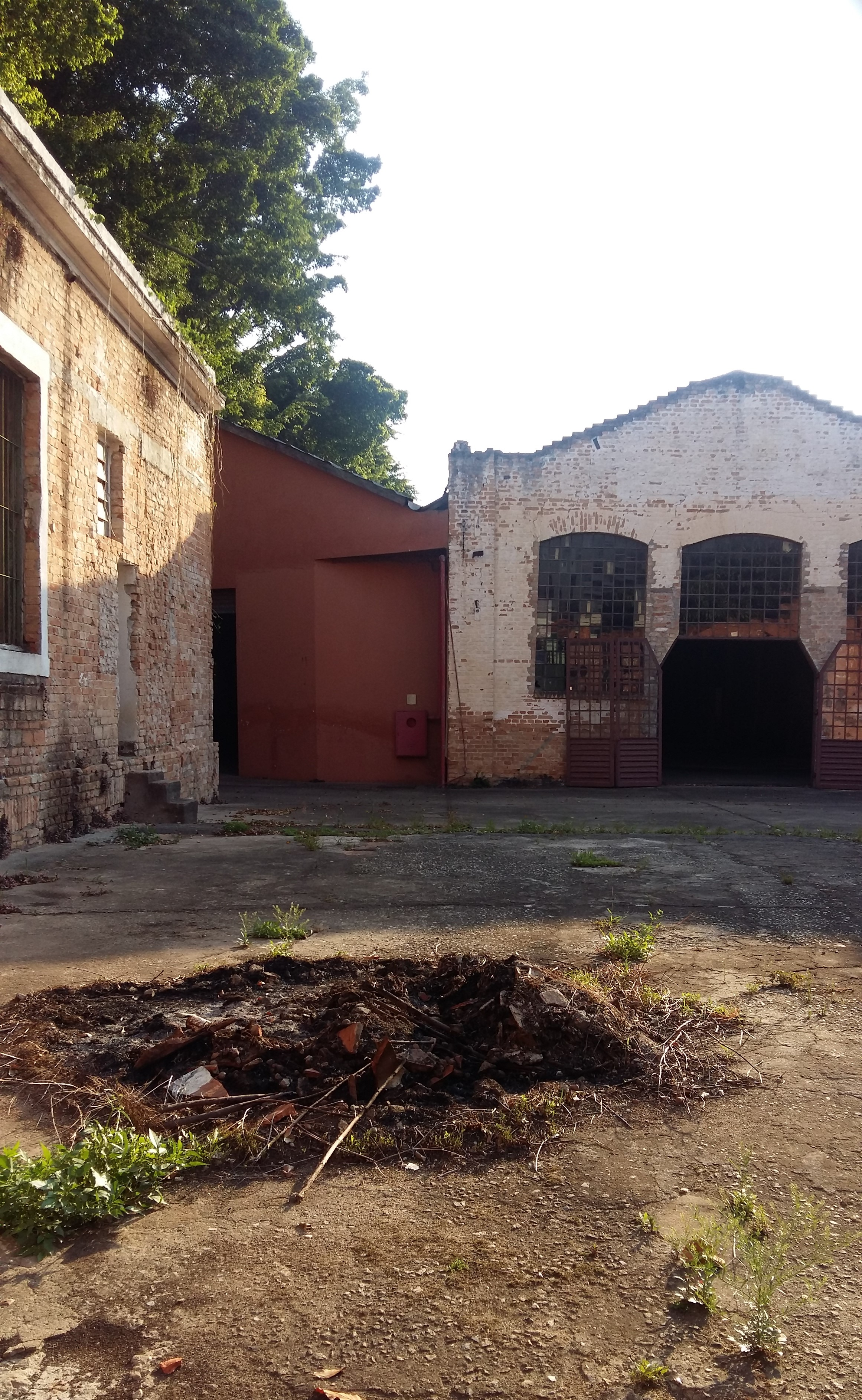 Área externa de um dos armazéns da Antiga São Paulo Railway, na Mooca em São Paulo - SP